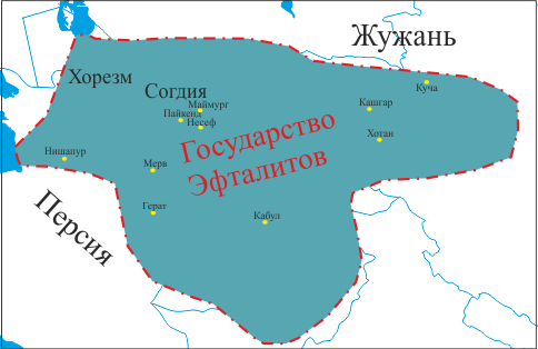 Карта Государство Эфталитов